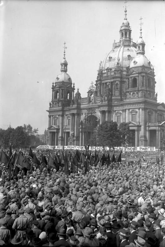 Das große Pfingstreffen der Rot-Front-Kämpfer im Lustgarten in Berlin! Blick in den Lustgarten von der Schlossfreiheit aus mit dem Dom und den Zehntausenden von Rot-Front-Kämpfern.